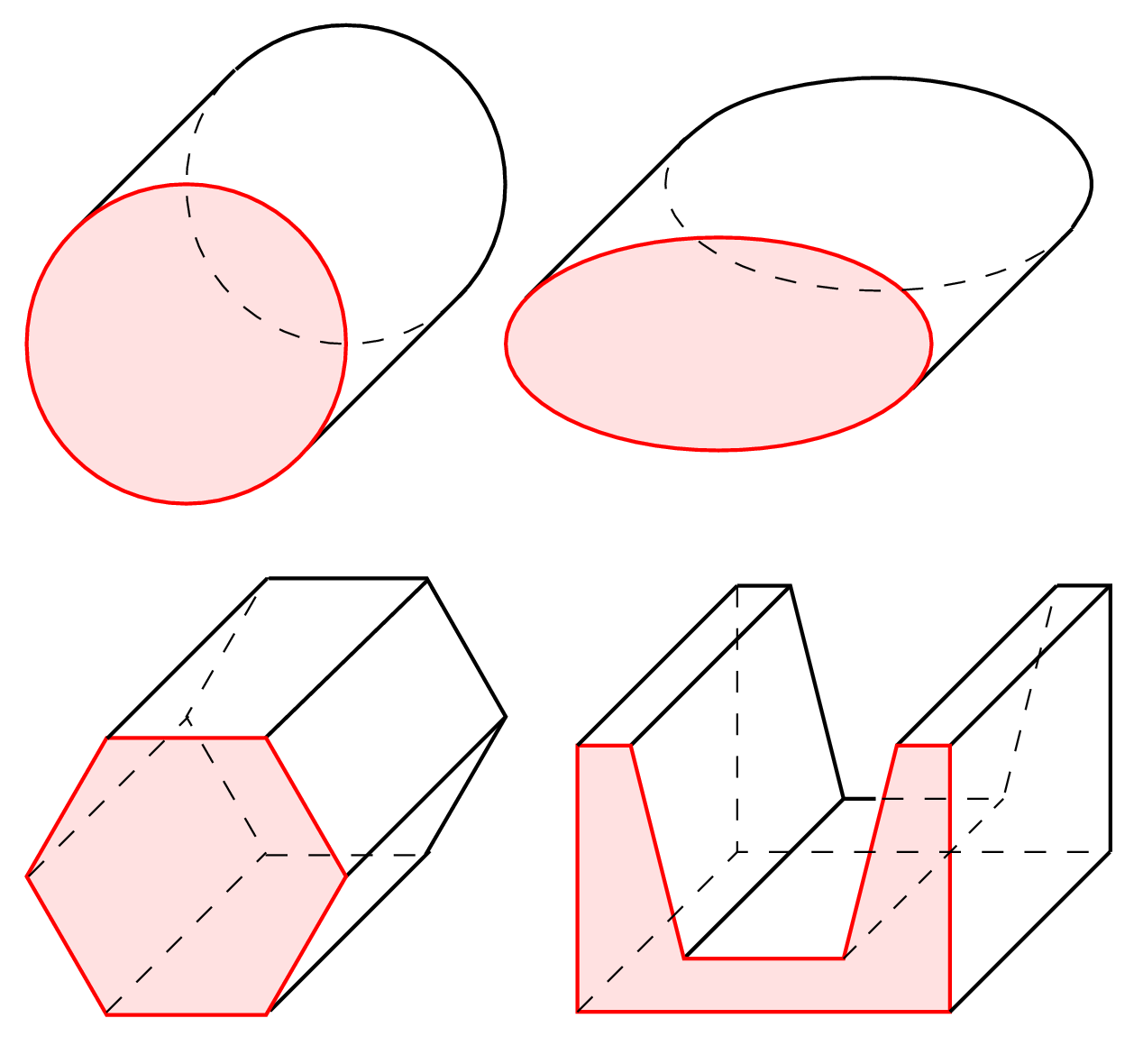 Beispiele von Zylindern incl Prismen